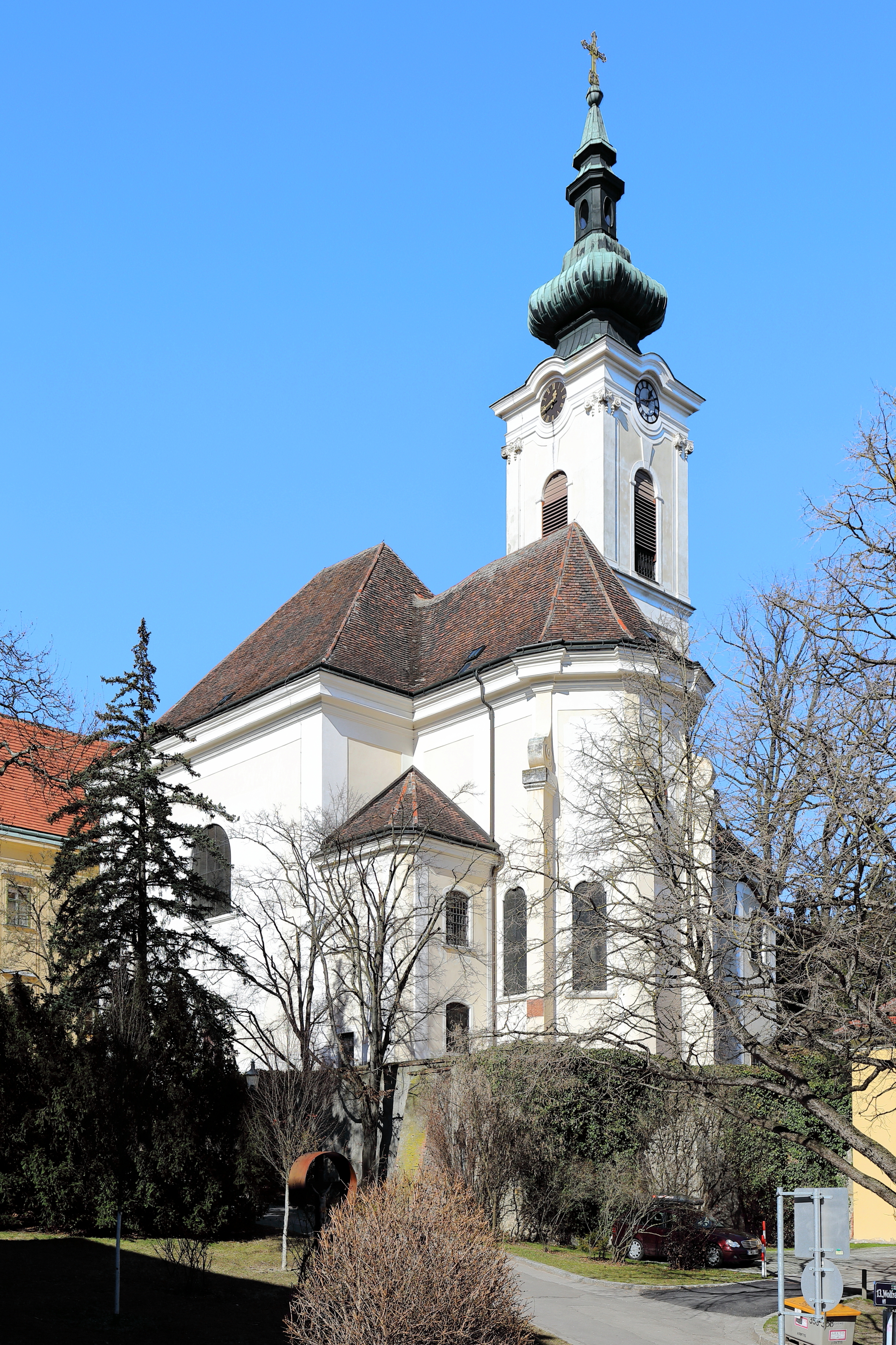 Südsüdostansicht der Pfarrkirche „Heiliger Veit und Maria, Zuflucht der Sünder“ in Ober St. Veit, ein Bezirksteil des 13. Gemeindebezirks Hietzing in der österreichischen Bundeshauptstadt Wien.Nachdem die Vorgängerkirche 1683 bei der Türkenbelagerung zerstört wurde, erfolgte 1742 im Prinzip ein barocker Neubau (lediglich der Altarraum und die darunterliegende Krypta blieben erhalten) durch Mathias Gerl, der am 22. August 1745 geweiht wurde.